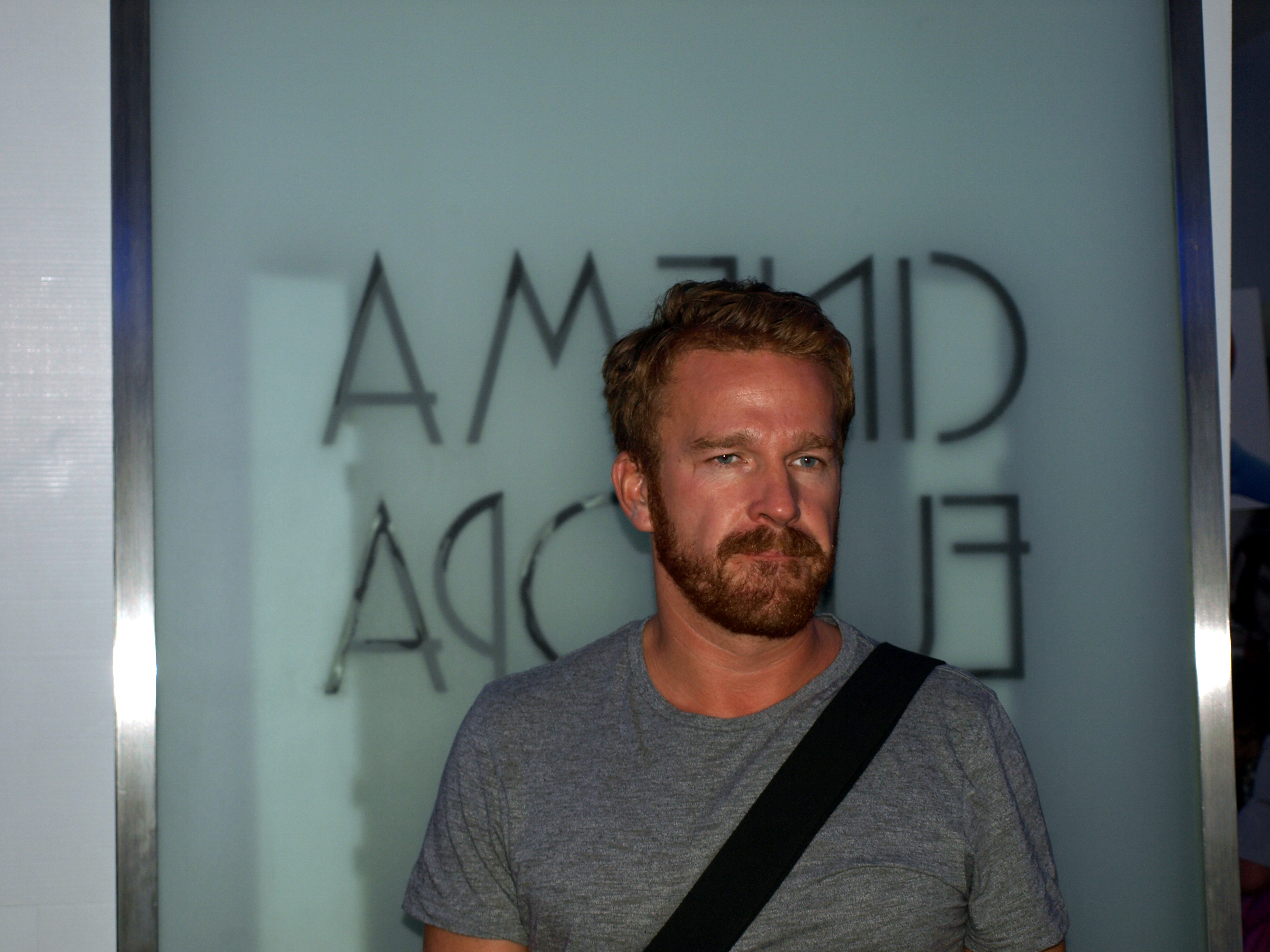 Stanislav Majer z novinářské projekce filmu Líbánky